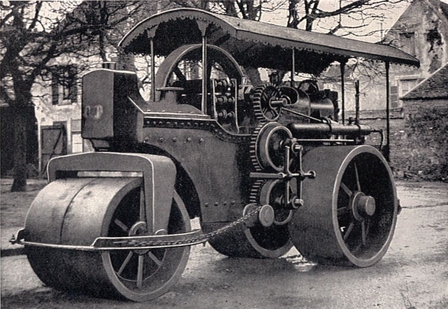 Oil engine road roller (Rankin Kennedy, Modern Engines, Vol III).jpg